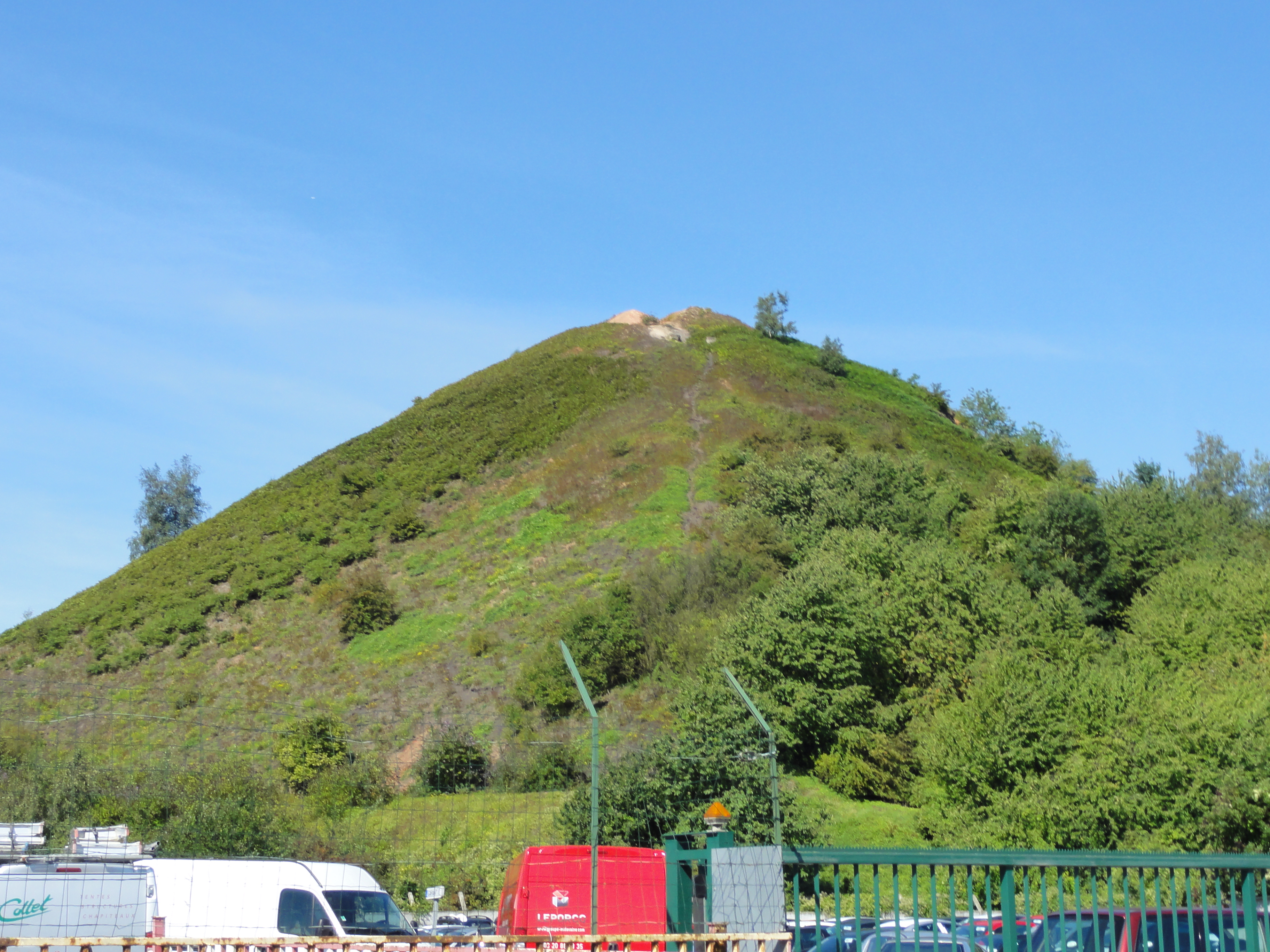 Terril n° 162 dit Renard, Fosse Renard de la Compagnie des mines d'Anzin, Denain, Nord, Nord-Pas-de-Calais, France.